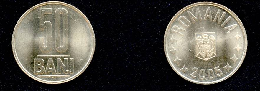 Romanian 50 Bani coin